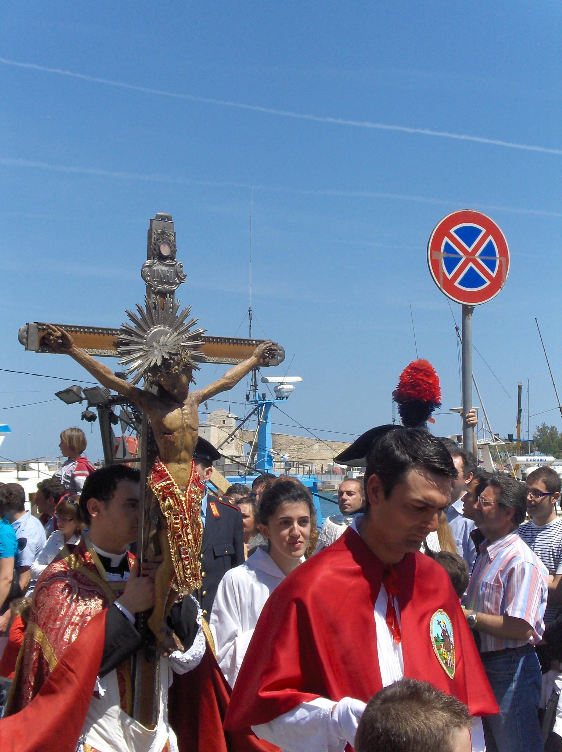 croce di colonna trani